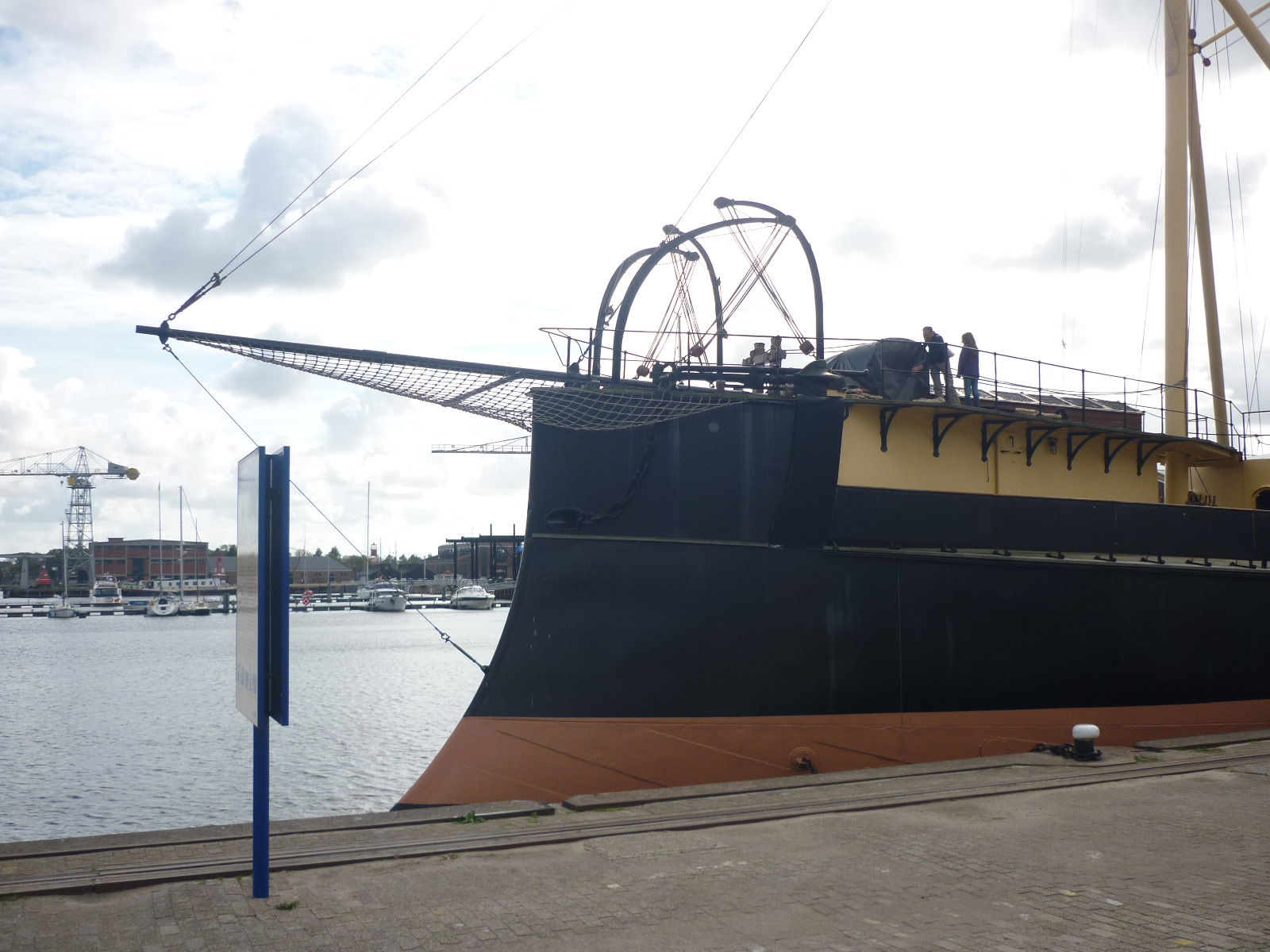 Steven des Rammschiffes "Schorpioen", Museumsschiff im Marinemuseum Den Helder, Niederlande